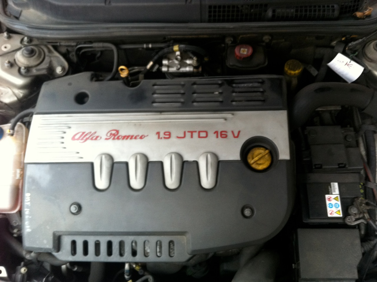 Motore Alfa Romeo JTD (1.9) su Alfa Romeo GT